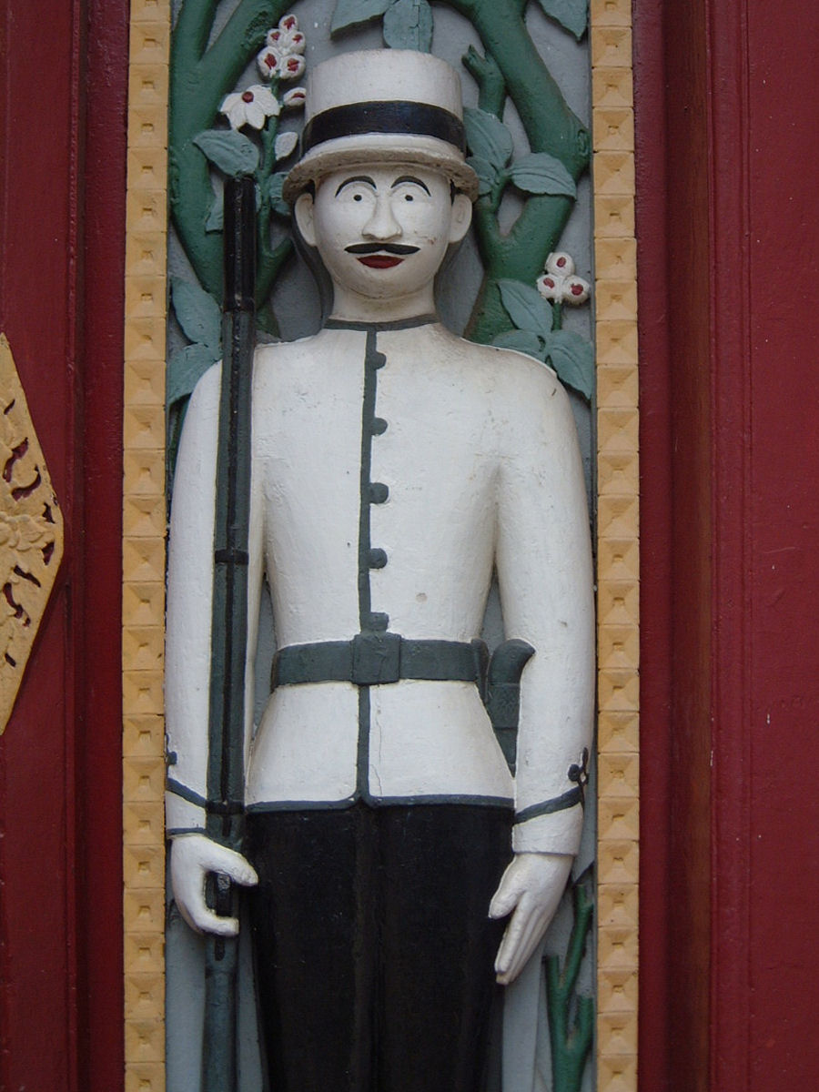 Wat Ratchabopit (วัดราชบพิธสถิตมหาสีมารามราชวรวิหาร), Bangkok, Thailand